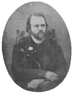 Charles-Valentin Alkan, sitting